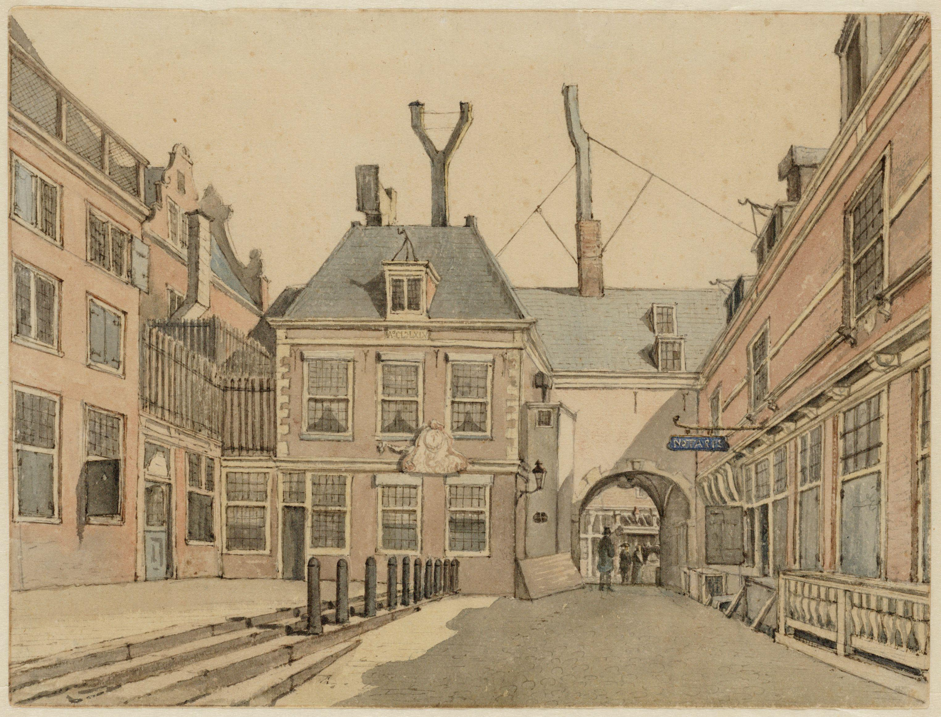 Beursplein. drawing. Height: 9 cm (3.5 ″); Width: 12 cm (4.7 ″) dimensions QS:P2048,9U174728;P2049,12U174728. Amsterdam, Stadsarchief Amsterdam, collectie tekeningen en prenten.